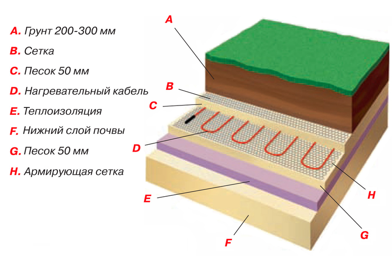 Подогрев земли в теплицах